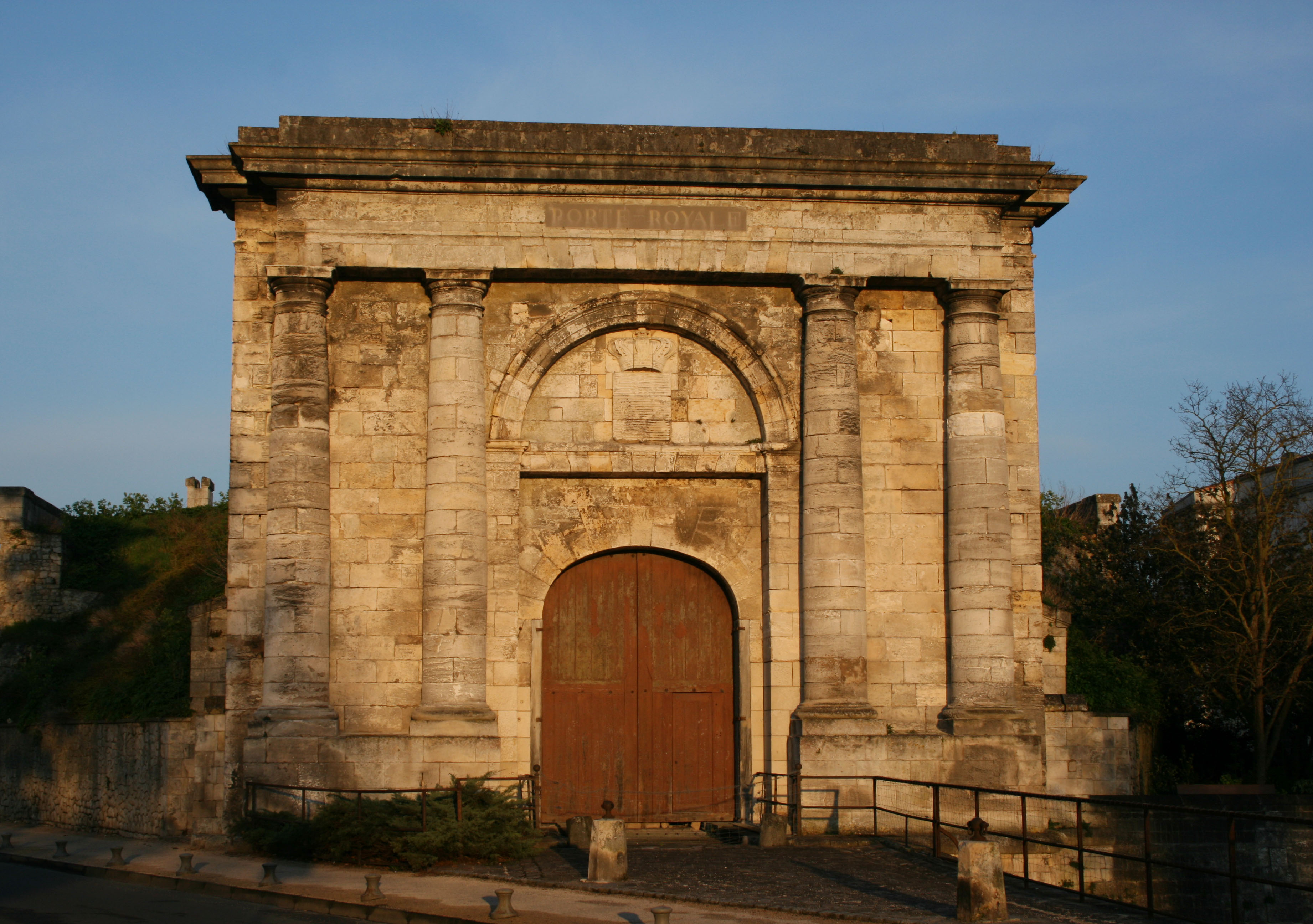 La Porte Royale à La Rochelle